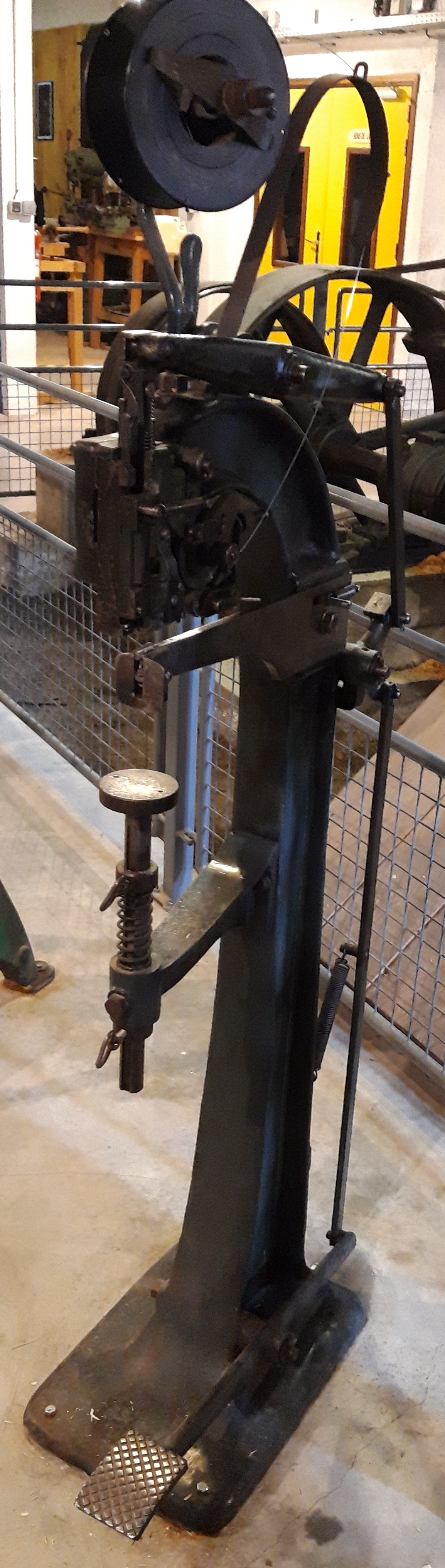 Agrafeuse industrielle utilisée pour la confection de boîte de fromages, musée des métiers du bois, Labaroche (Haut-Rhin)